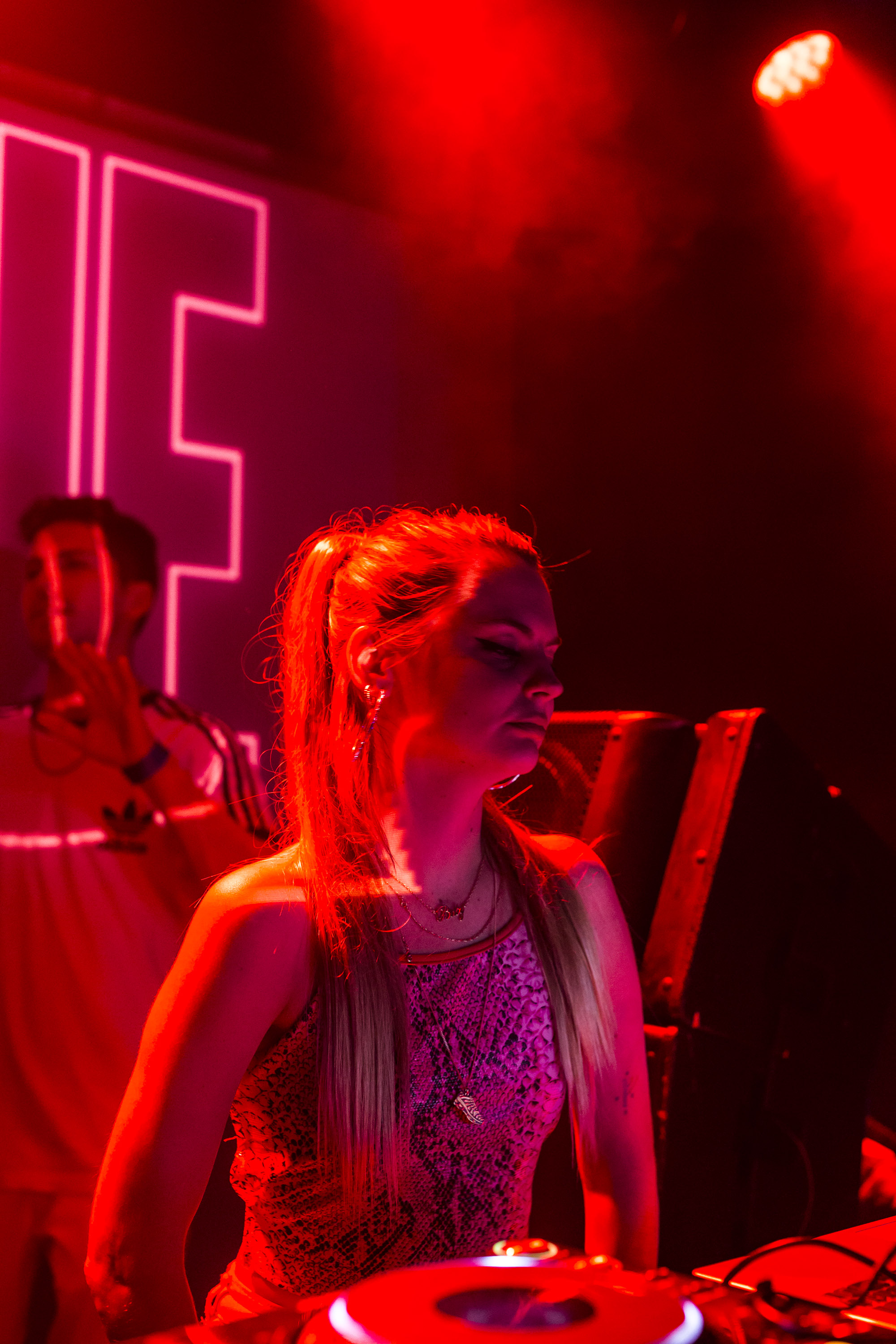 Artista: Niwen Paola Autora: Alba Ruperez para El Bloque TV Detalles: Sala Apolo, Barcelona. Abril 2018